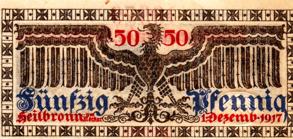 Notgeldschein der Stadt Heilbronn über 50 Pfennig von 1917, Vorder- und Rückseite